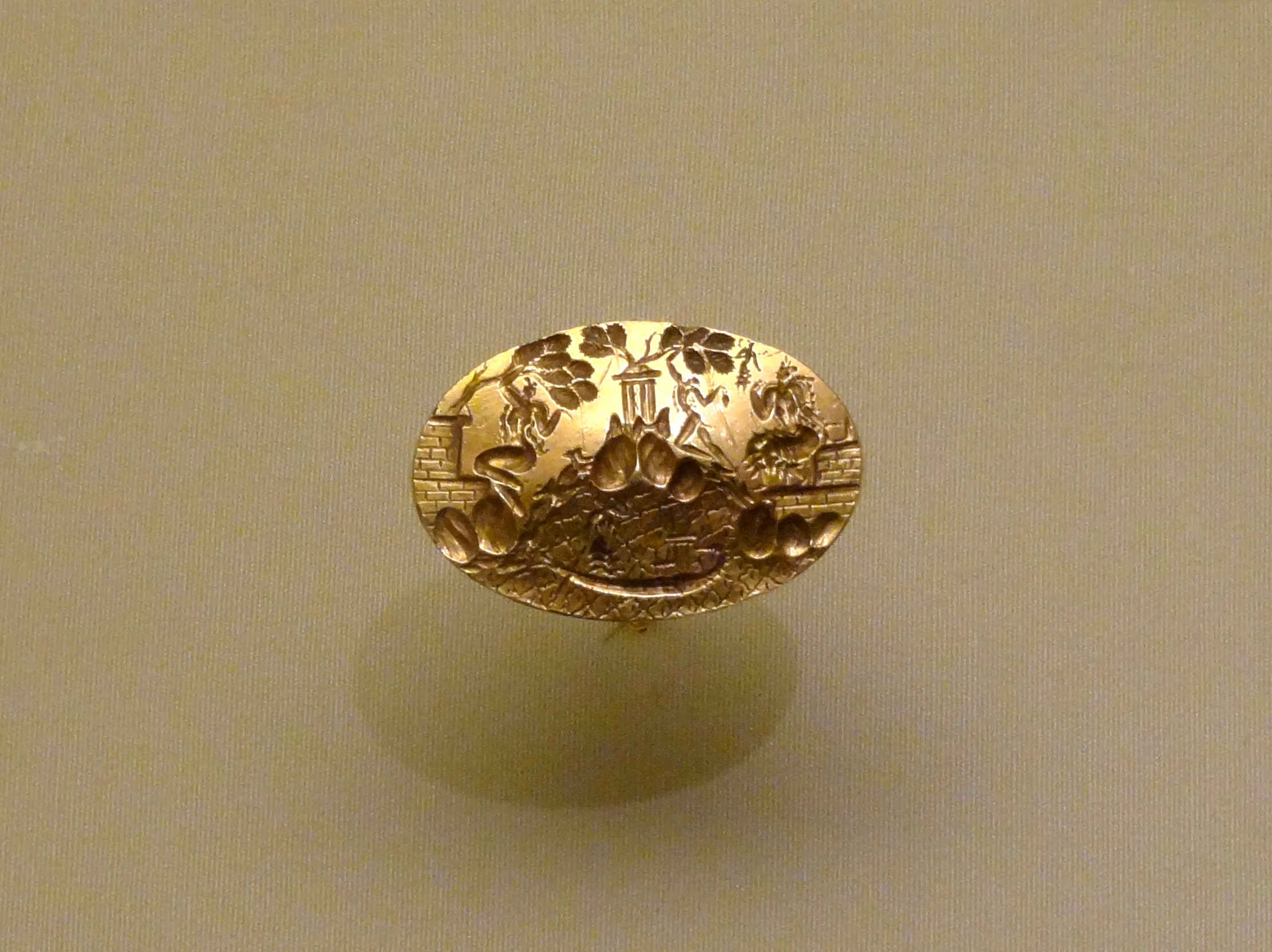 Goldener minoischer Siegelring, sogenannter „Ring des Minos“, (späte Neupalastzeit, 1500–1400 v. Chr.) aus Knossos, ausgestellt im Archäologischen Museum Iraklio, Kreta, Griechenland